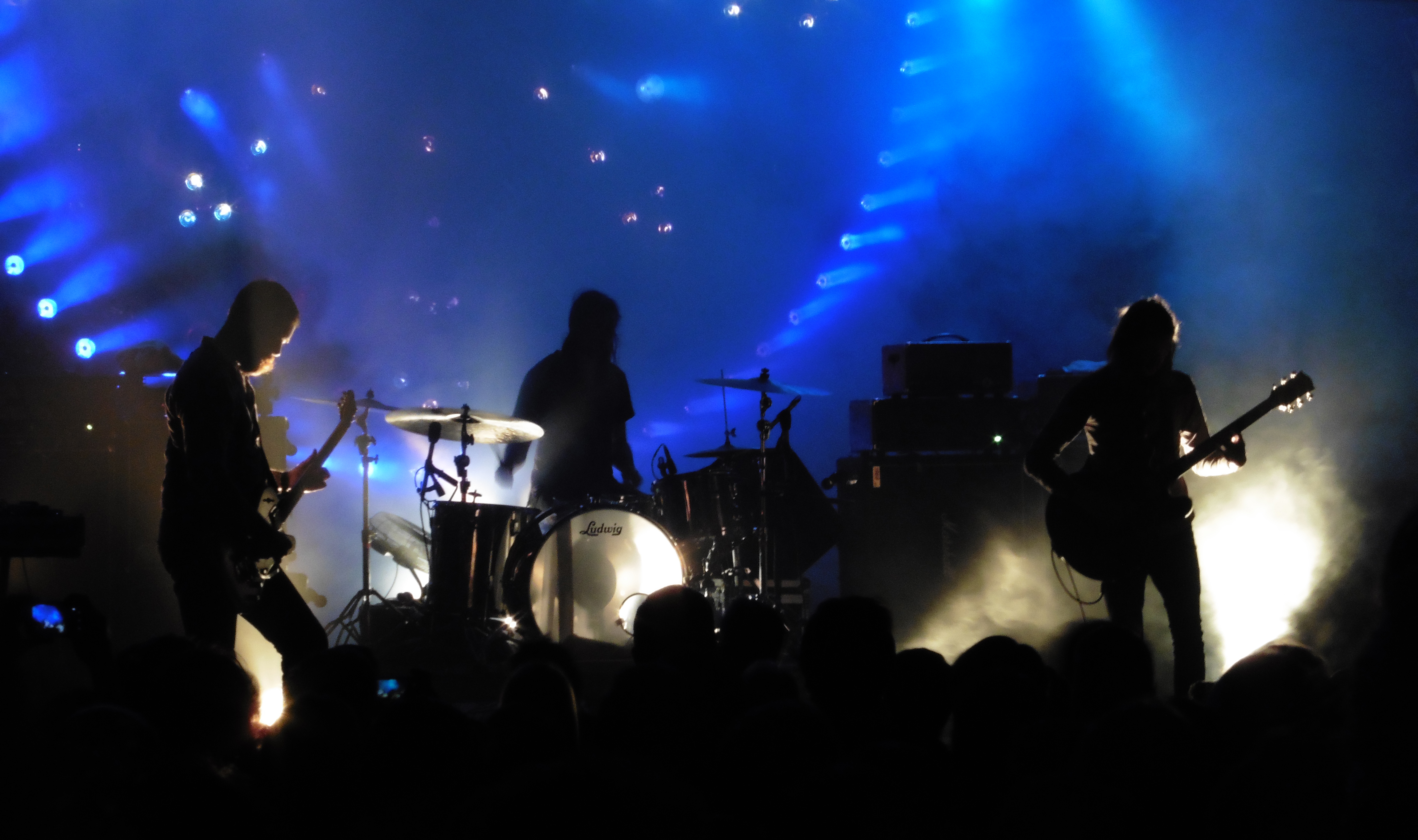 Russian Circles - Madrid - 15 abril 2015 1